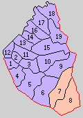 大分県西国東郡の町村制時点の町村。